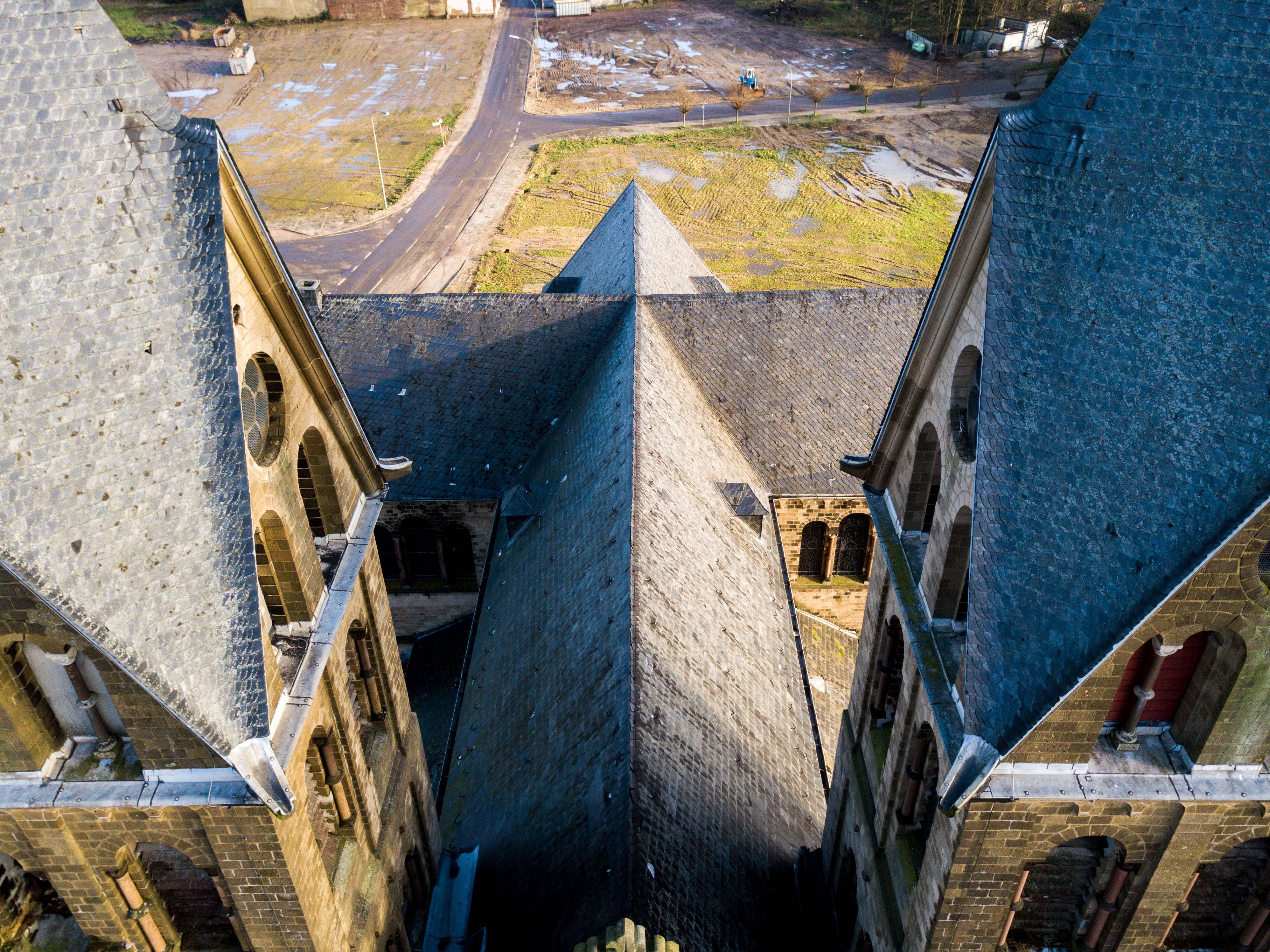 Drei Wochen bevor der Ort Immerath dem Braunkohletagebau von Garzweiler (Hintergrund) zum Opfer fällt, betrachtet die Fotodrohne den kleinen "Dom" aus westlicher Richtung von oben.